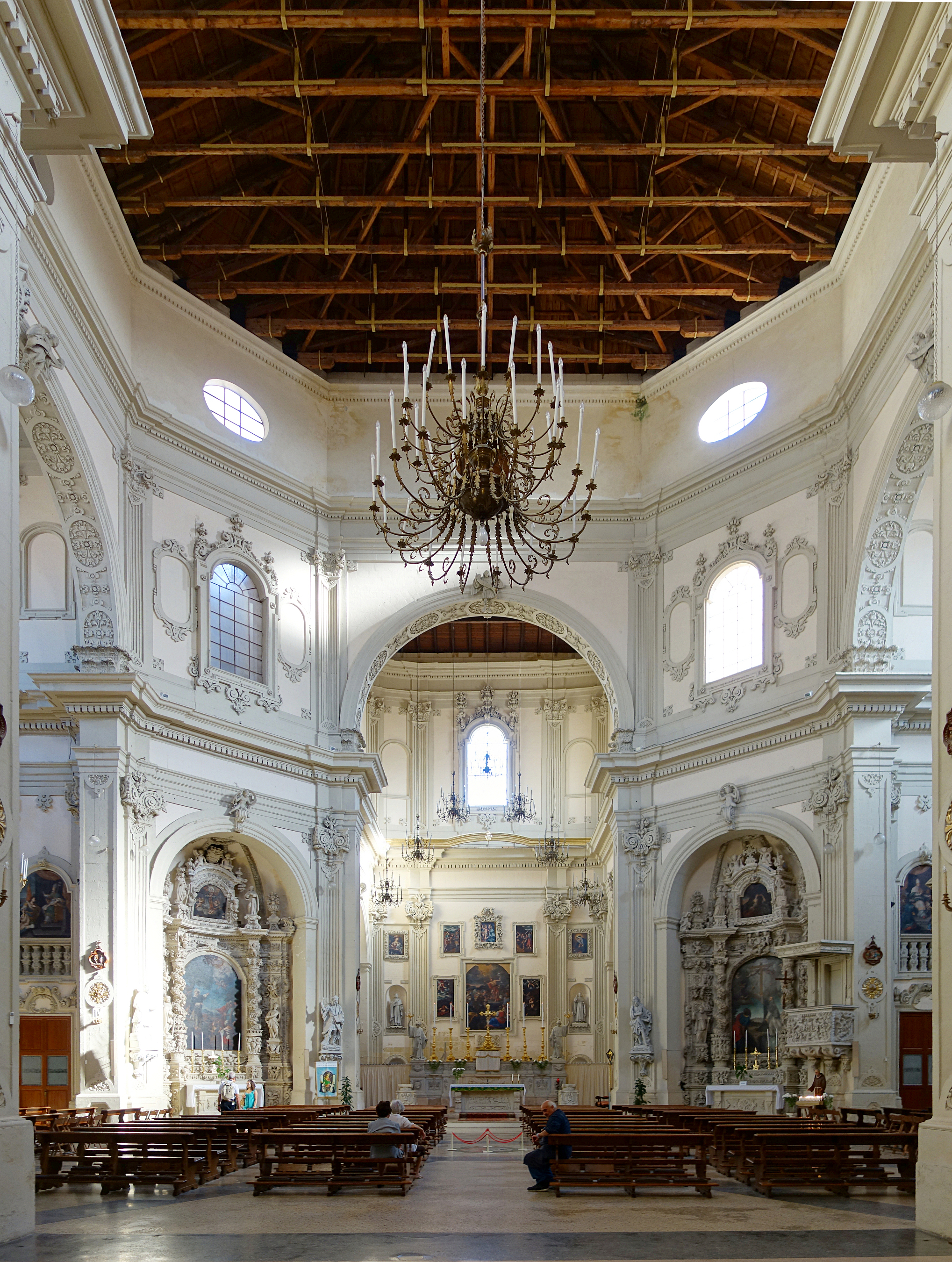 Le chœur de l'église San Giovanni Battista de Lecce.